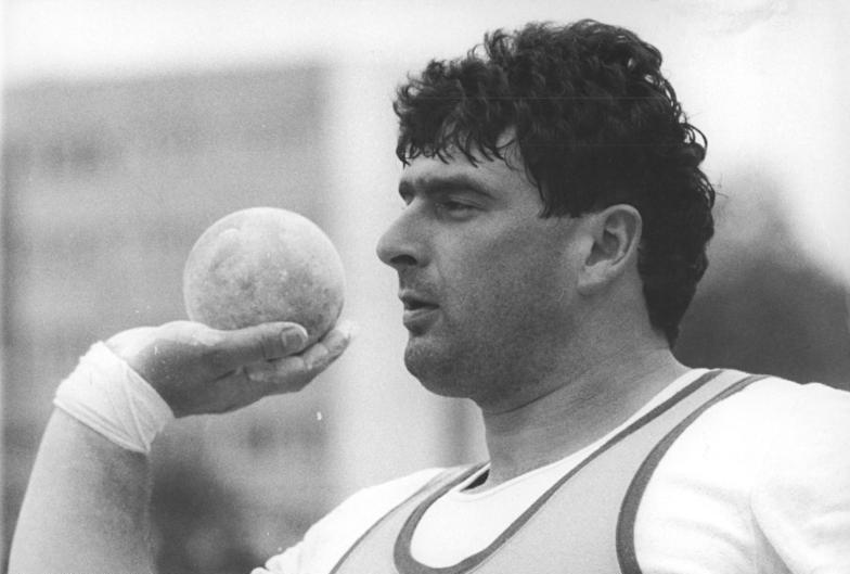 Udo Beyer ADN-ZB Settnik 8.6.86 Neubrandenburg: Europameisterschafts-Qualifikation der DDR-Leichtathleten- In Abwesenheit des Weltrekordlers Ulf Timmermann (TSC Berlin) siegte der 30jährige Potsdamer ASK-Sportler Udo Beyer am 7.6.86 mit der ausgezeichneten Weite von 21,86 m im Kugelstoßen. Mit 21,39, 20,98 und 21,45 m wurden für den Ex-Weltrekordler weitere nicht alltägliche Leistungen registriert.